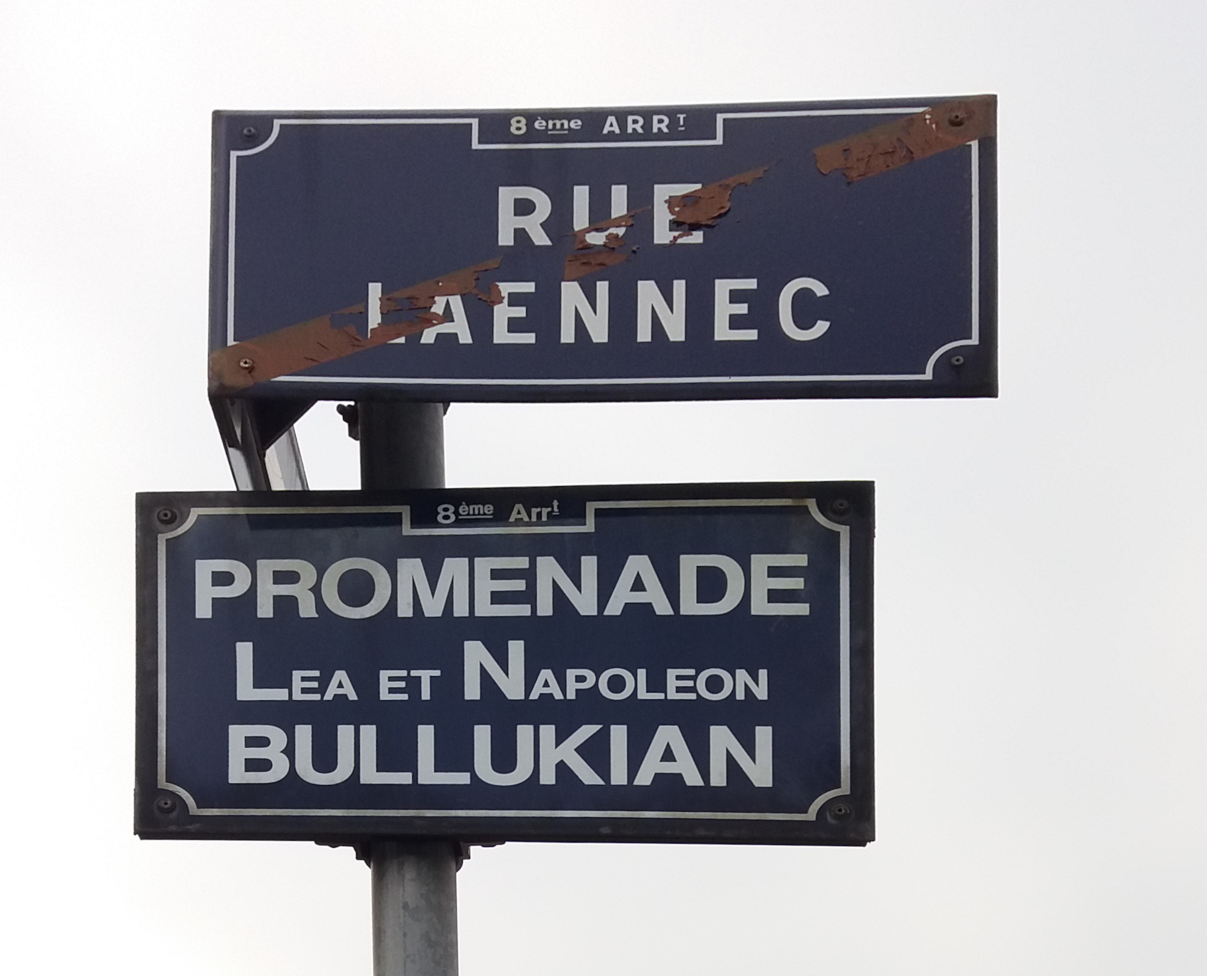 Plaque.